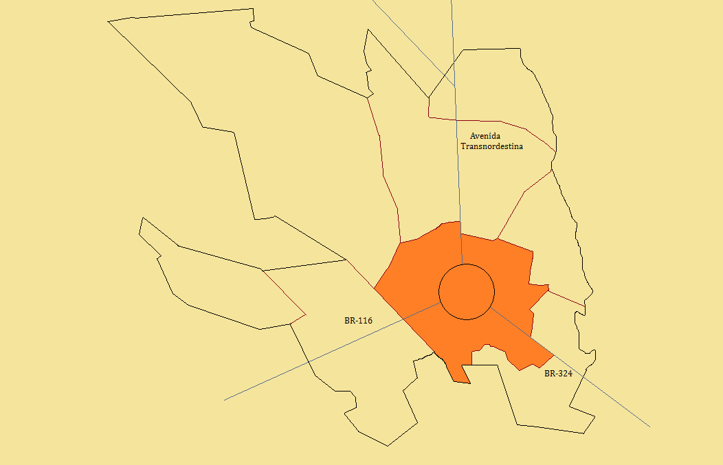 Distrito central de Feira de Santana, em cor laranja.